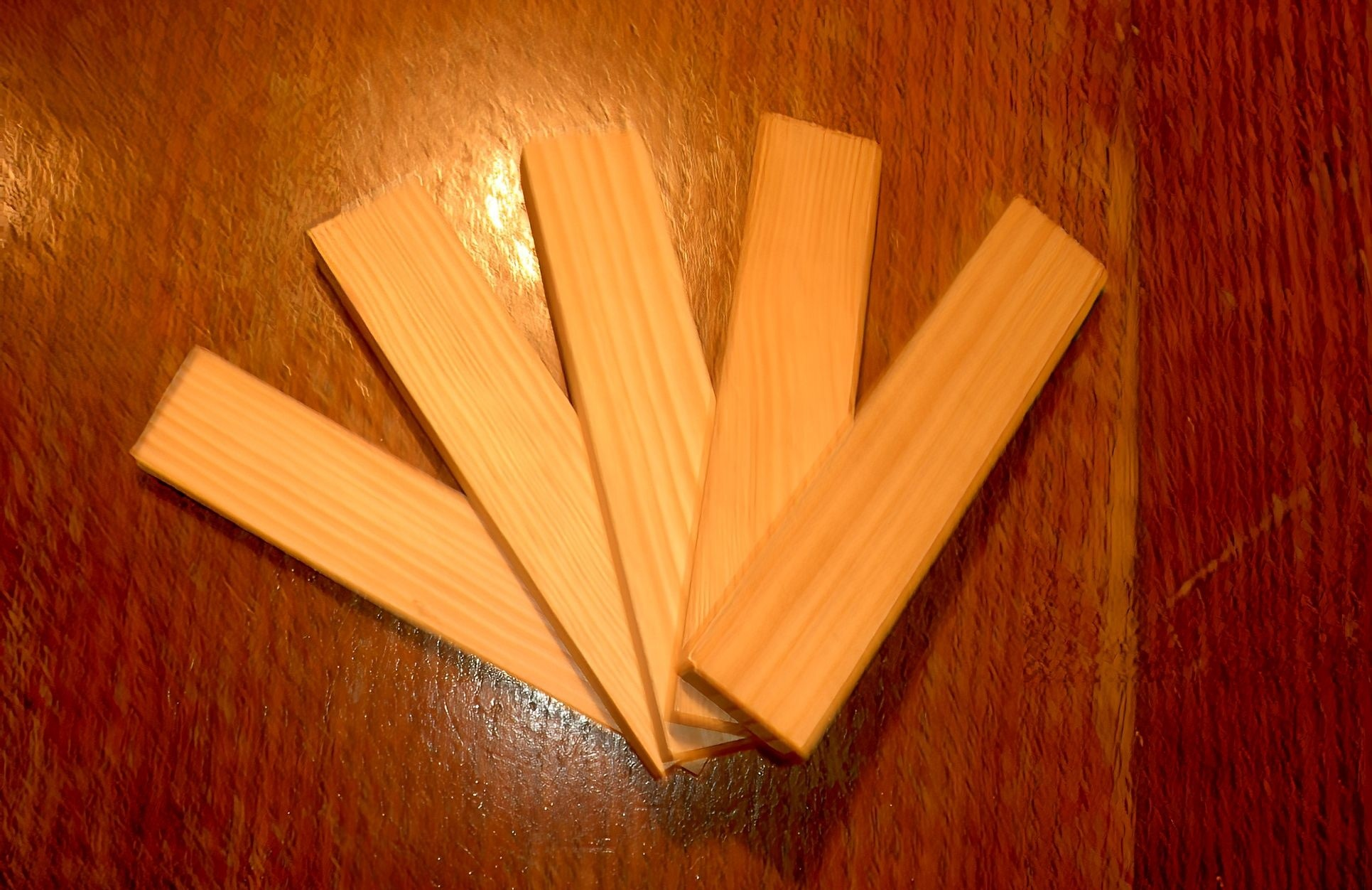 5 Kapla blocks